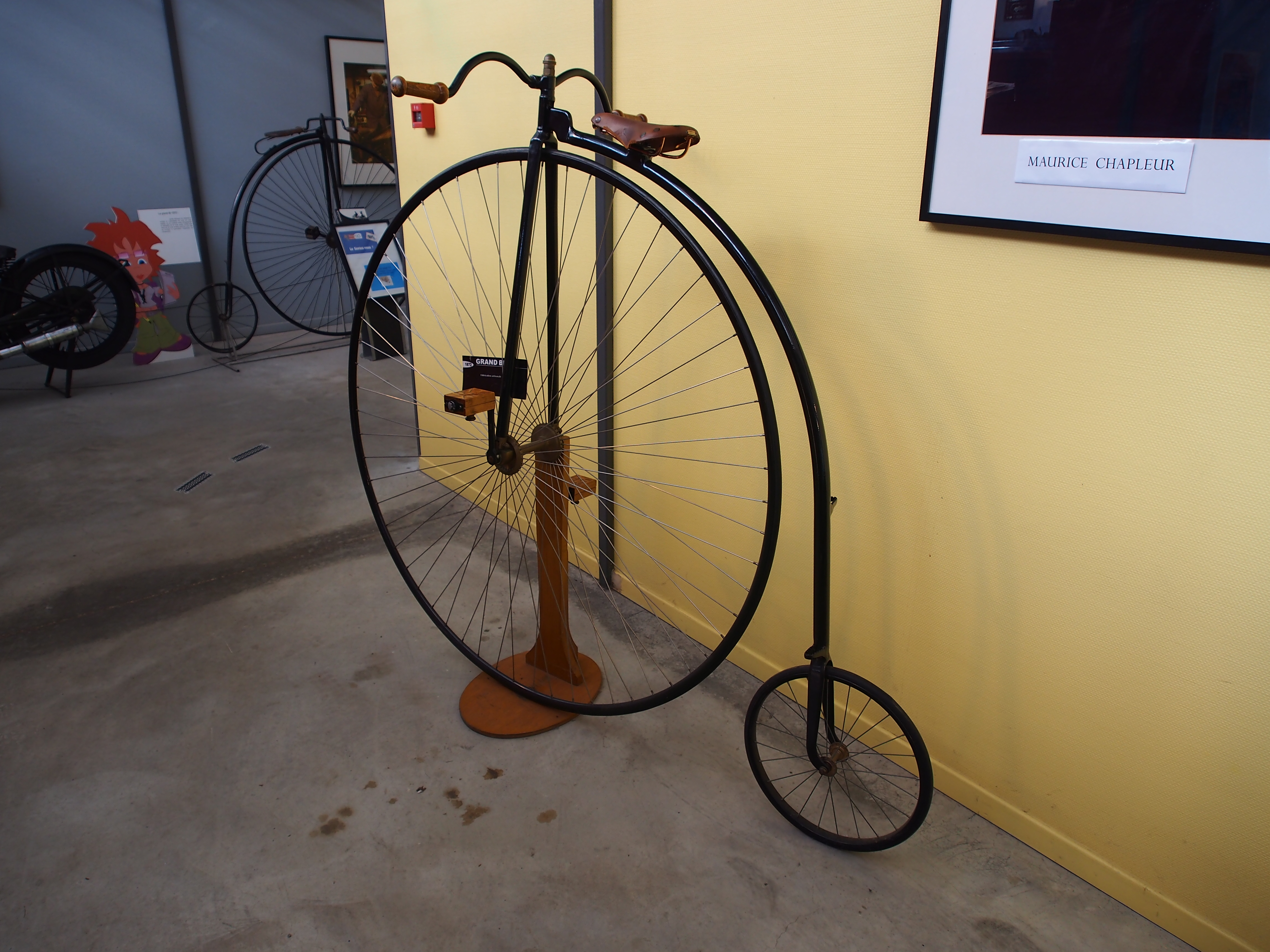 Photographed at the Musée de la Moto et du Vélo, Amneville, France.